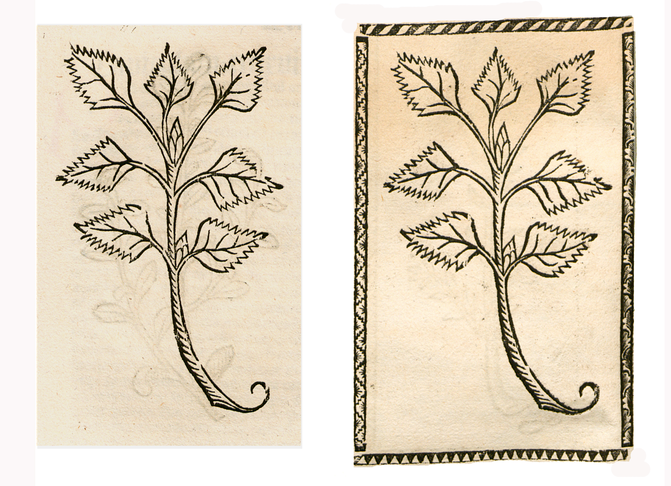 Abbildung von: Nebten (Nepeta cataria)